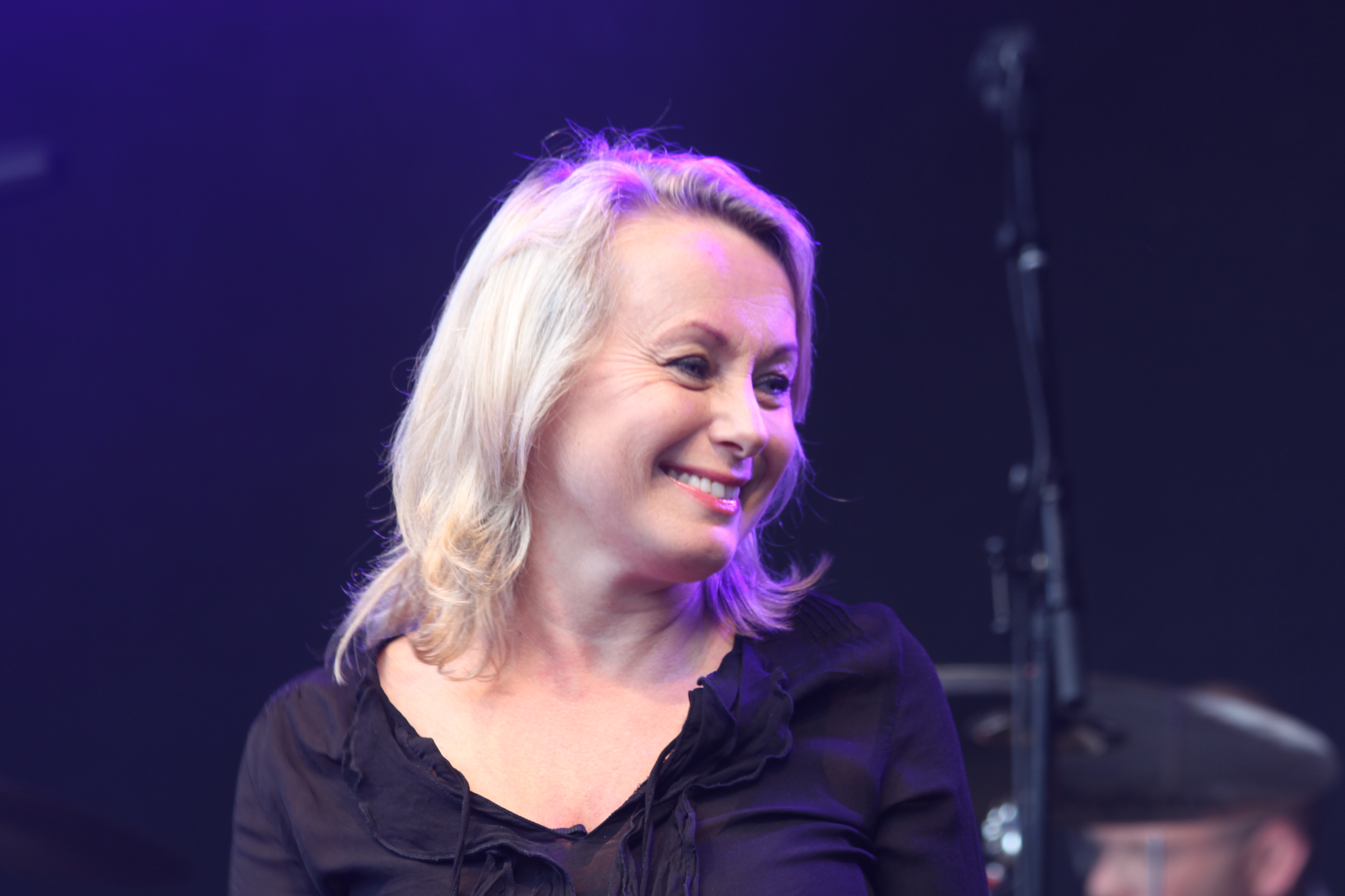 Louise Hoffsten live i Södertälje. 4 juli 2013.